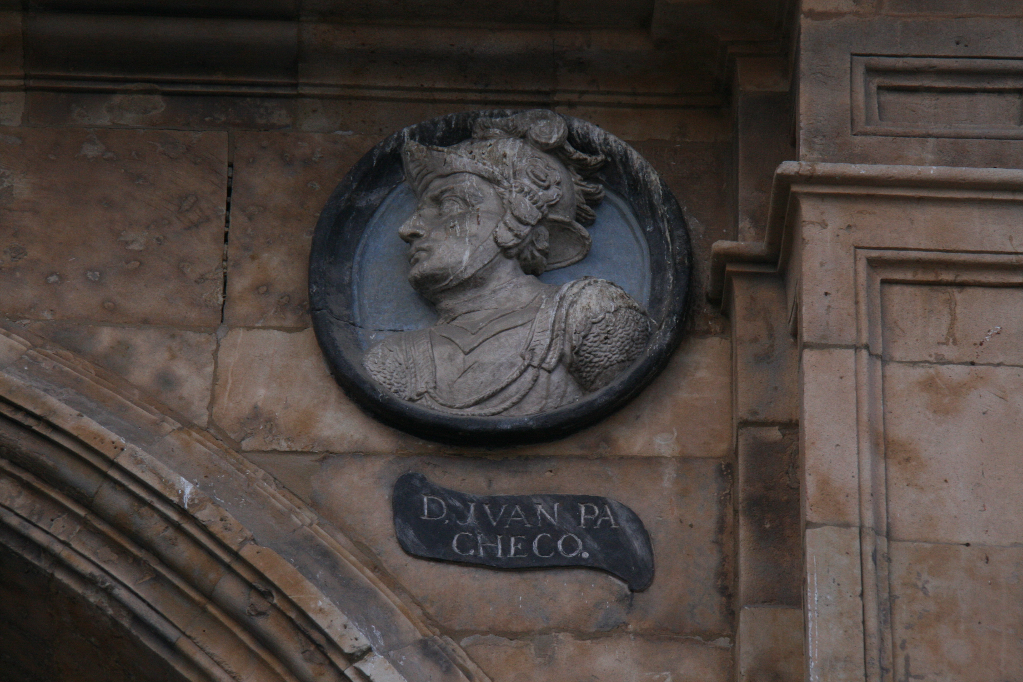 Juan Pacheco Girón en la Plaza Mayor de Salamanca (Pabellón de San Martín)